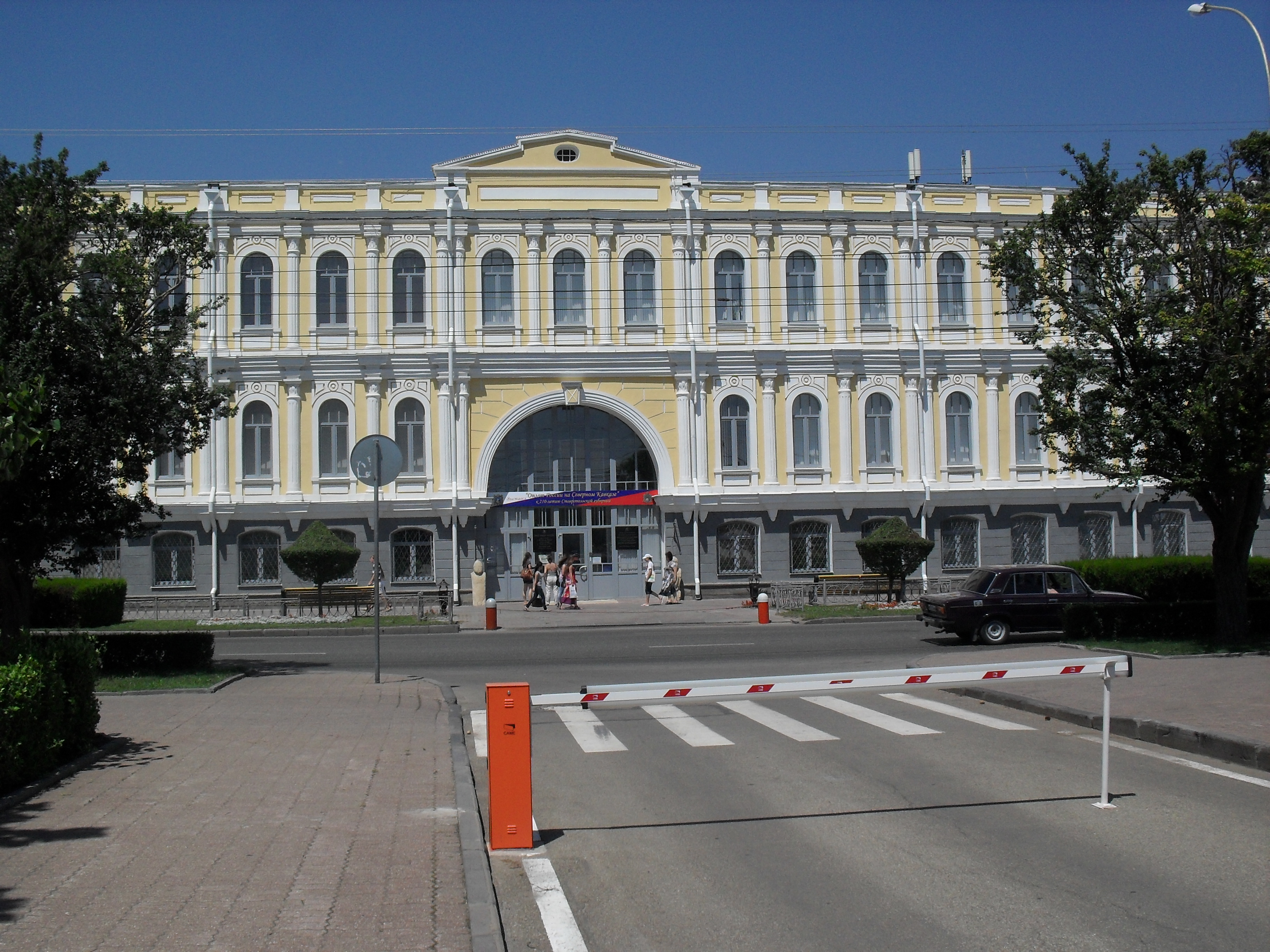 Ставропольский государственный краеведческий музей имени Г. Н. Прозрителева и Г. К. Праве